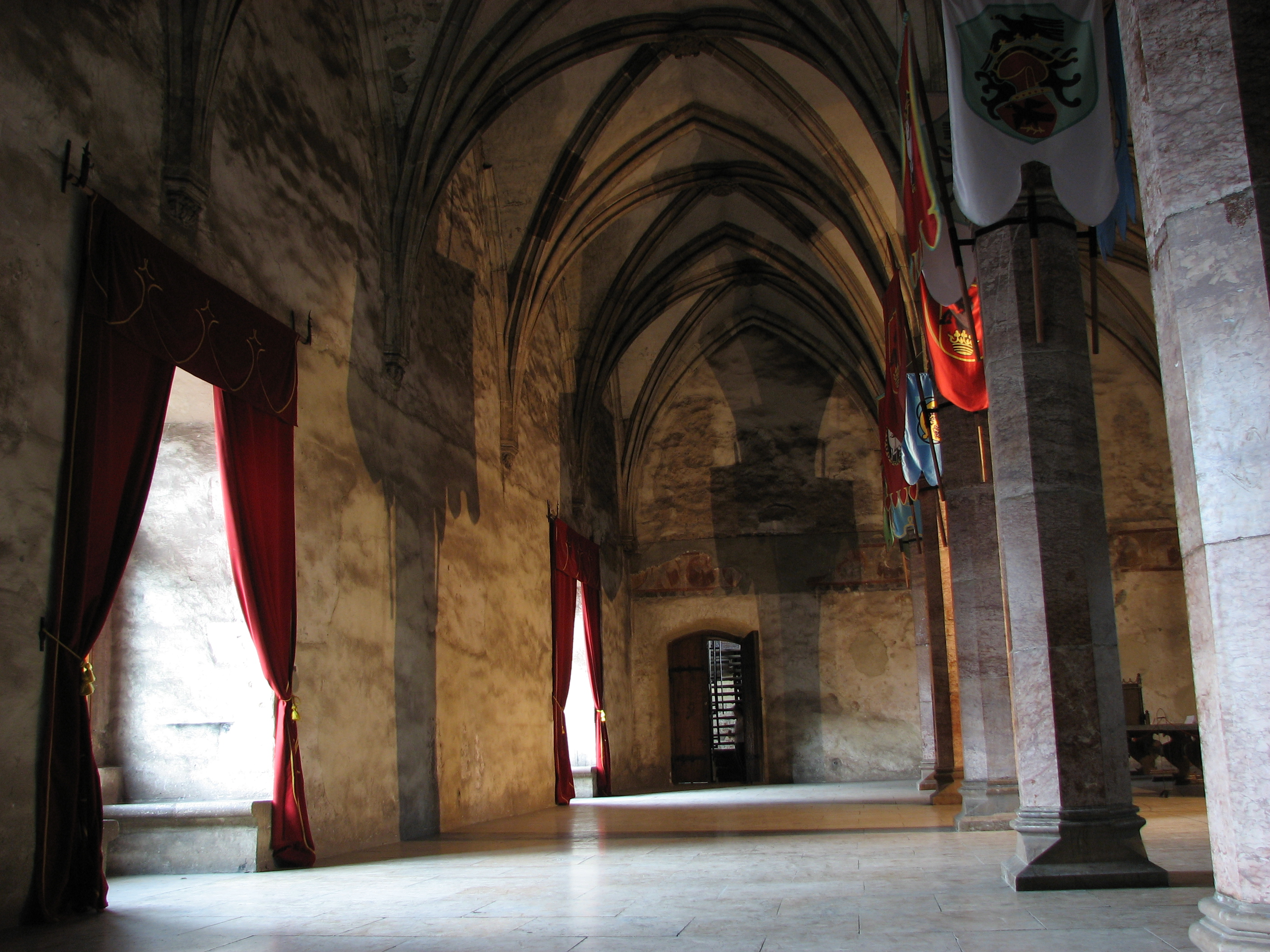 Hunyadi Castle, Hunedoara, RomaniaCorvin's Castle - Hunedoara